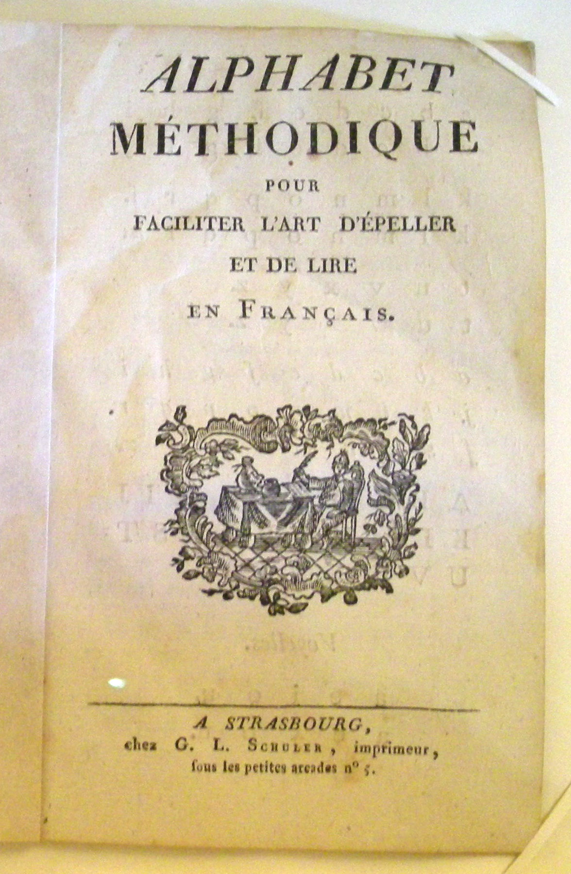 Méthode de lecture conçue par le pasteur Jean-Georges Stuber (1762)